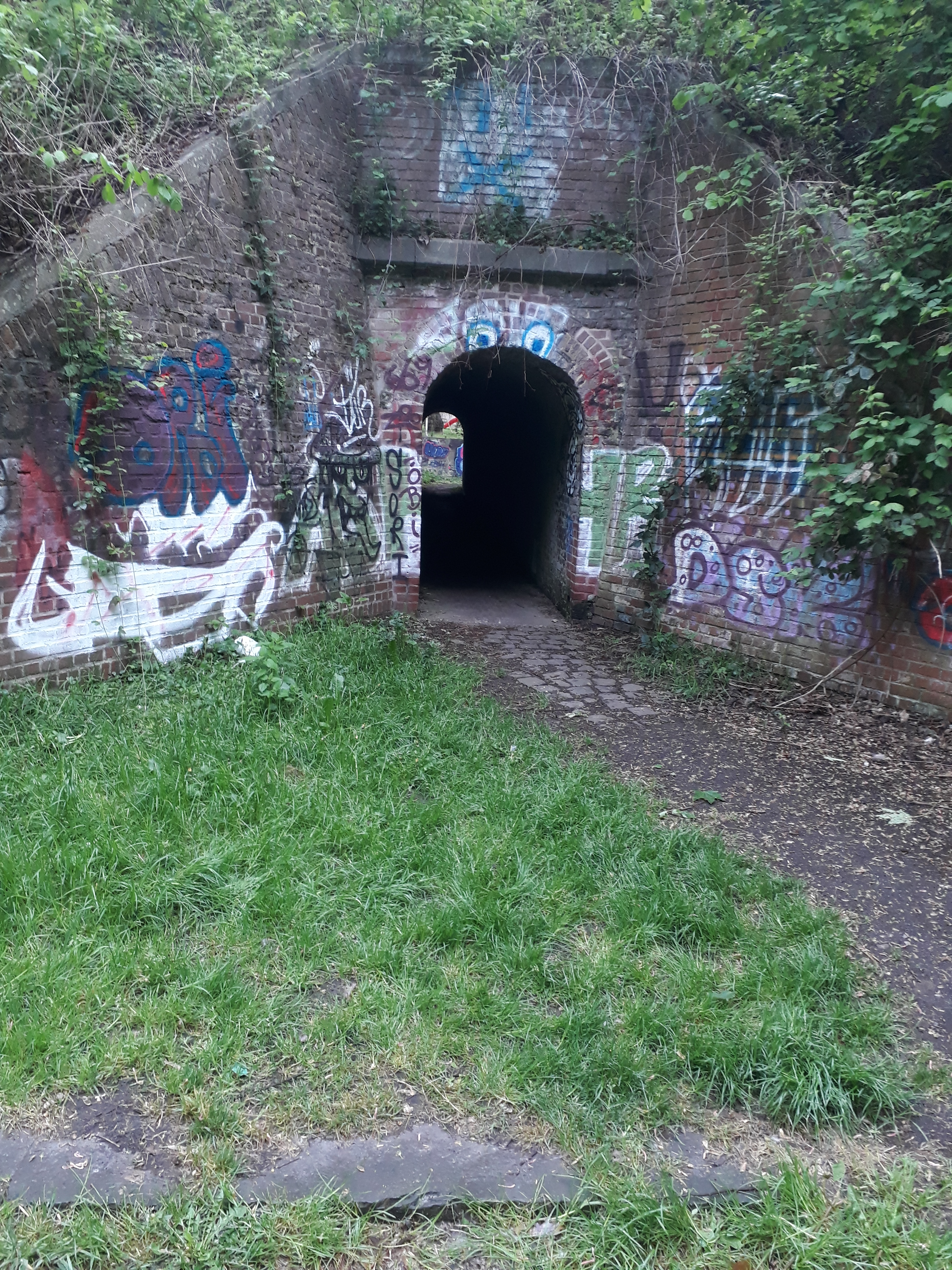 Pont sous les rails de la ligne Liège Tongres par où passe le Rida, conjointement avec le sentier n° 100 de Herstal. La pierre bleue à l'avant-plan marque l'endroit ou le Rida émergeait de nouveau